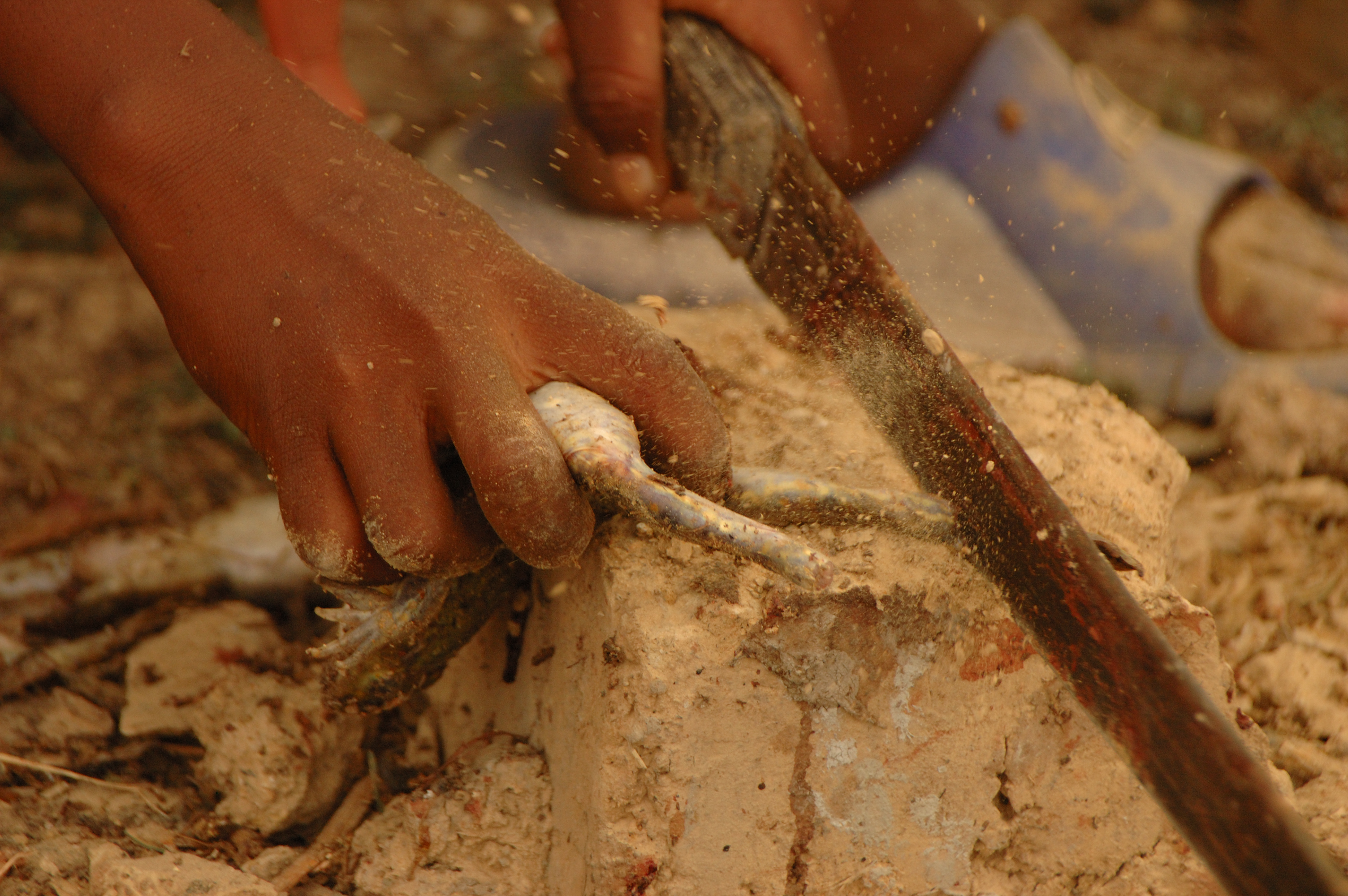 Arrachage des pattes d'une grenouille en vue de sa dégustation